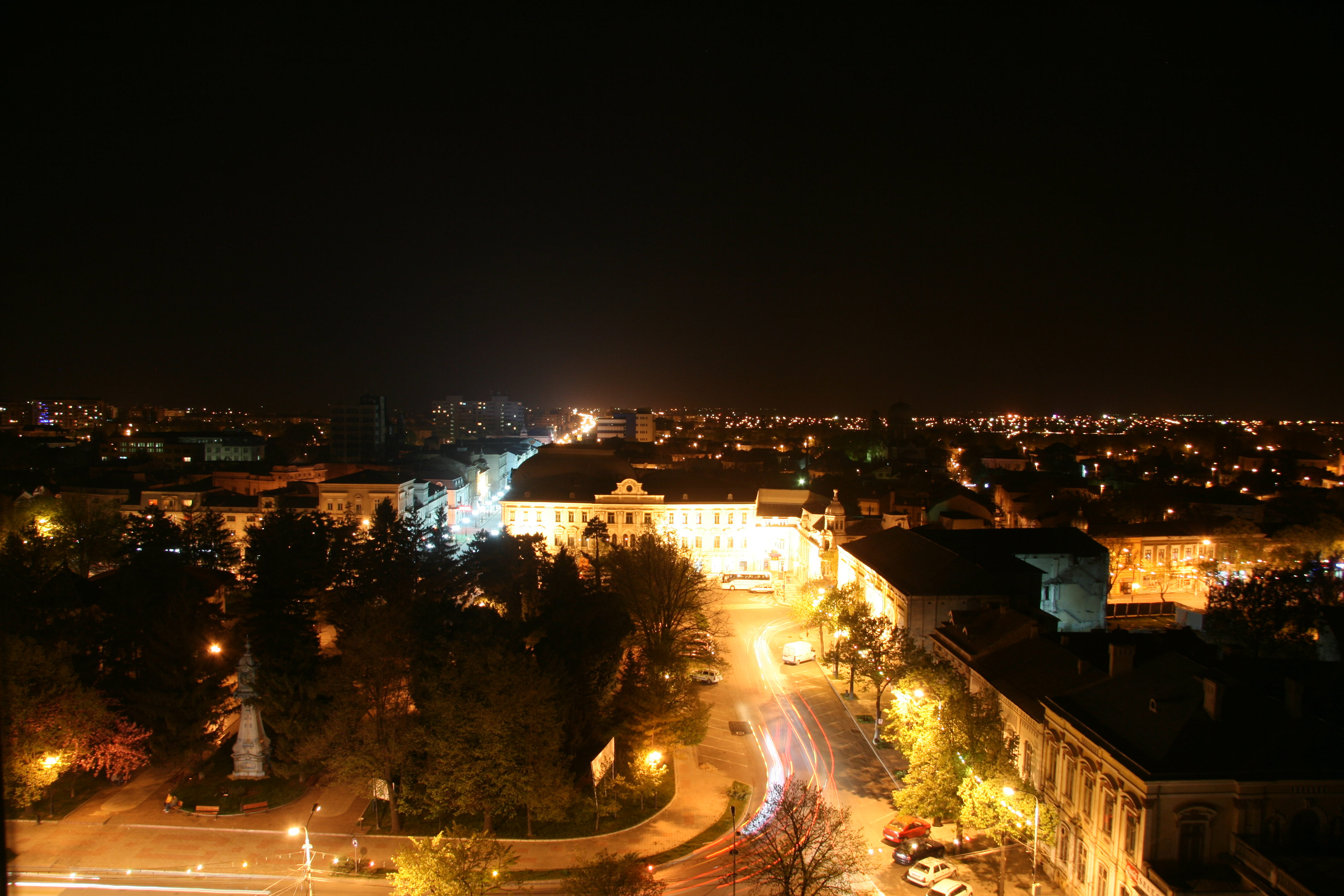 In fata se afla Teatrul " Rally", azi Teatrul "Maria Filotti", in stanga se afla Ceasul public iar in dreapta sediul Muzeului Brăilei.